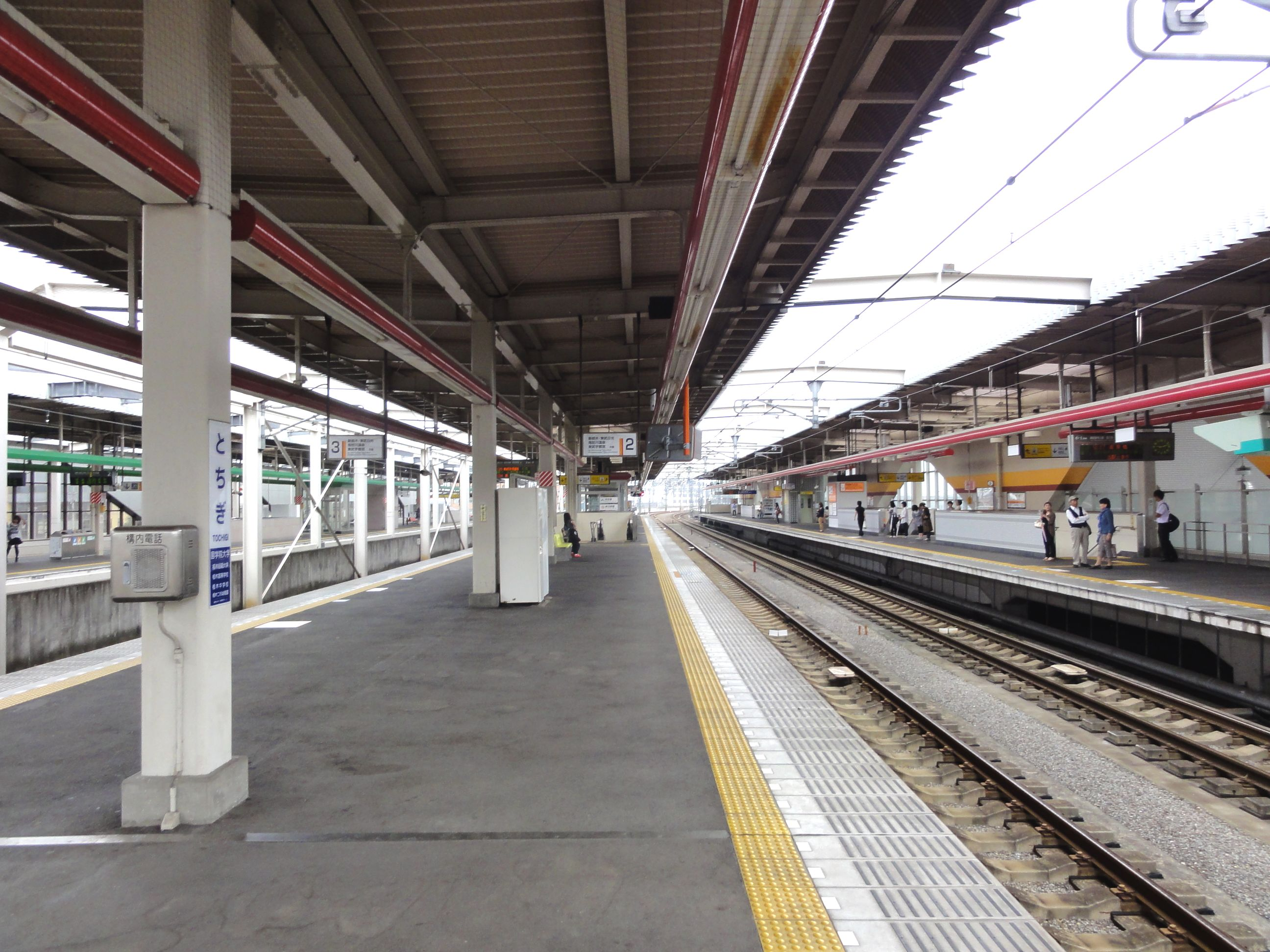 栃木駅ホーム（東武）